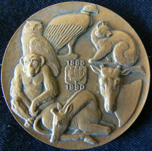 Памятная медаль "125 лет ленинградскому зоопарку" (реверс)